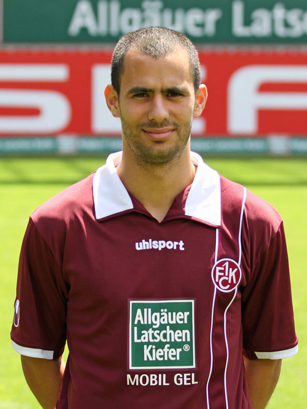 Gil Vermouth, Fußballspieler